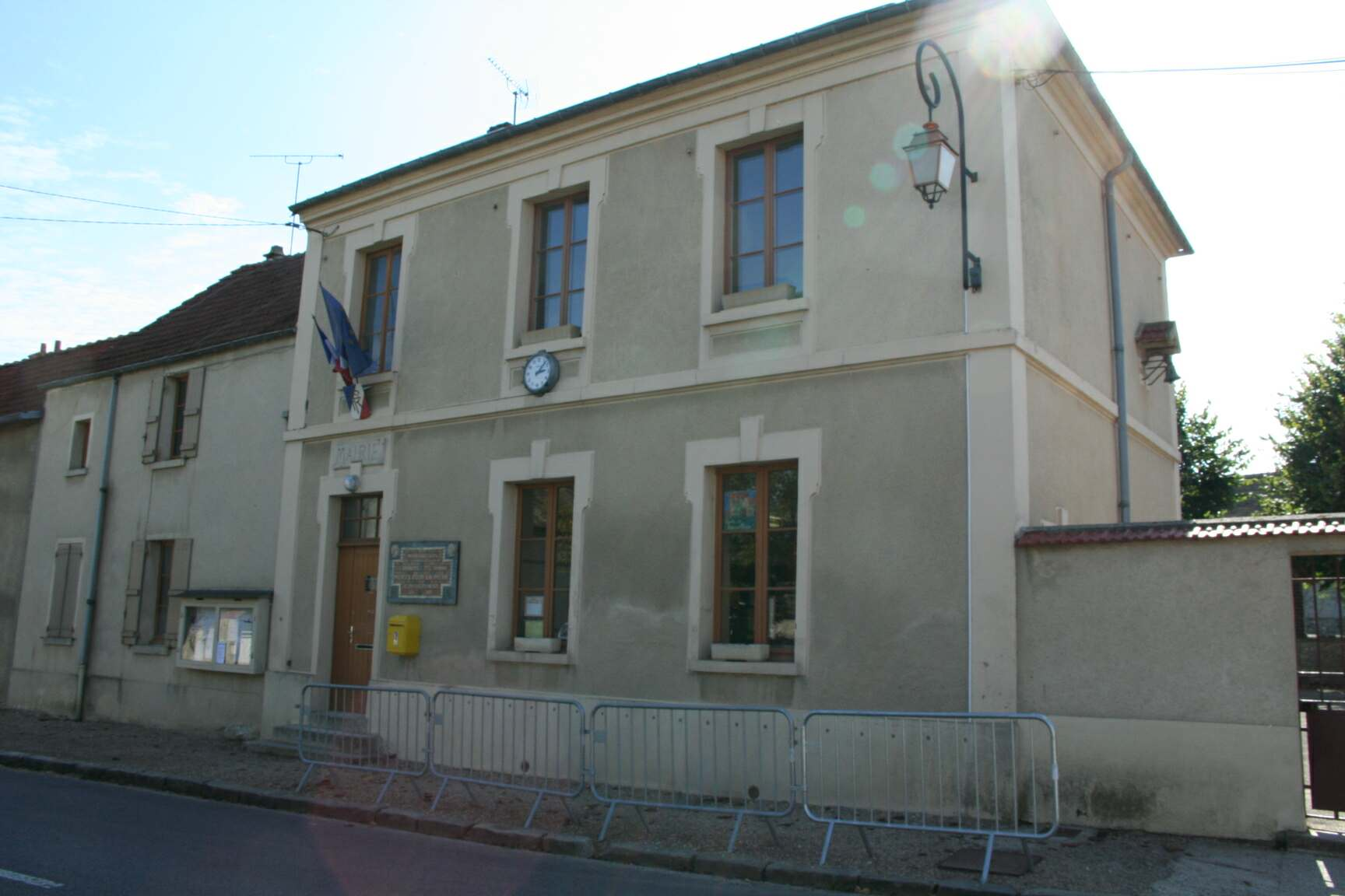 Mairie de Boinvilliers - Yvelines (France)